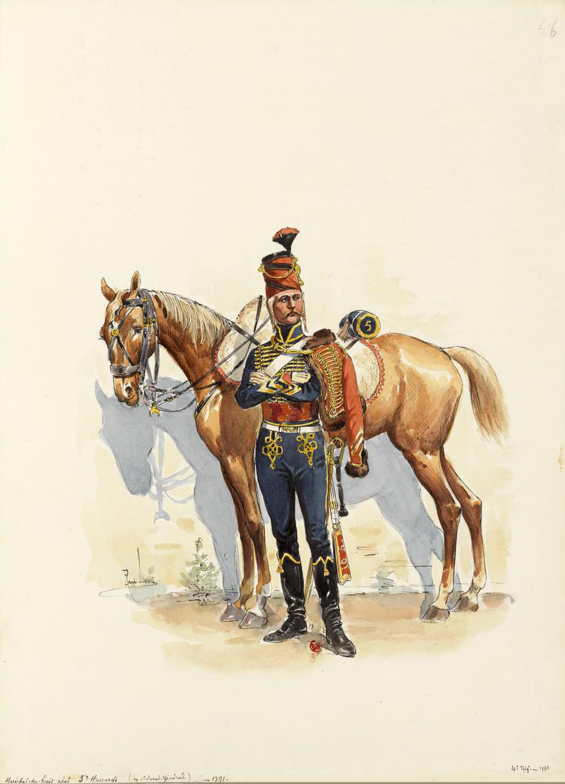 Maréchal des logis Chef du 5e Hussards en 1791.